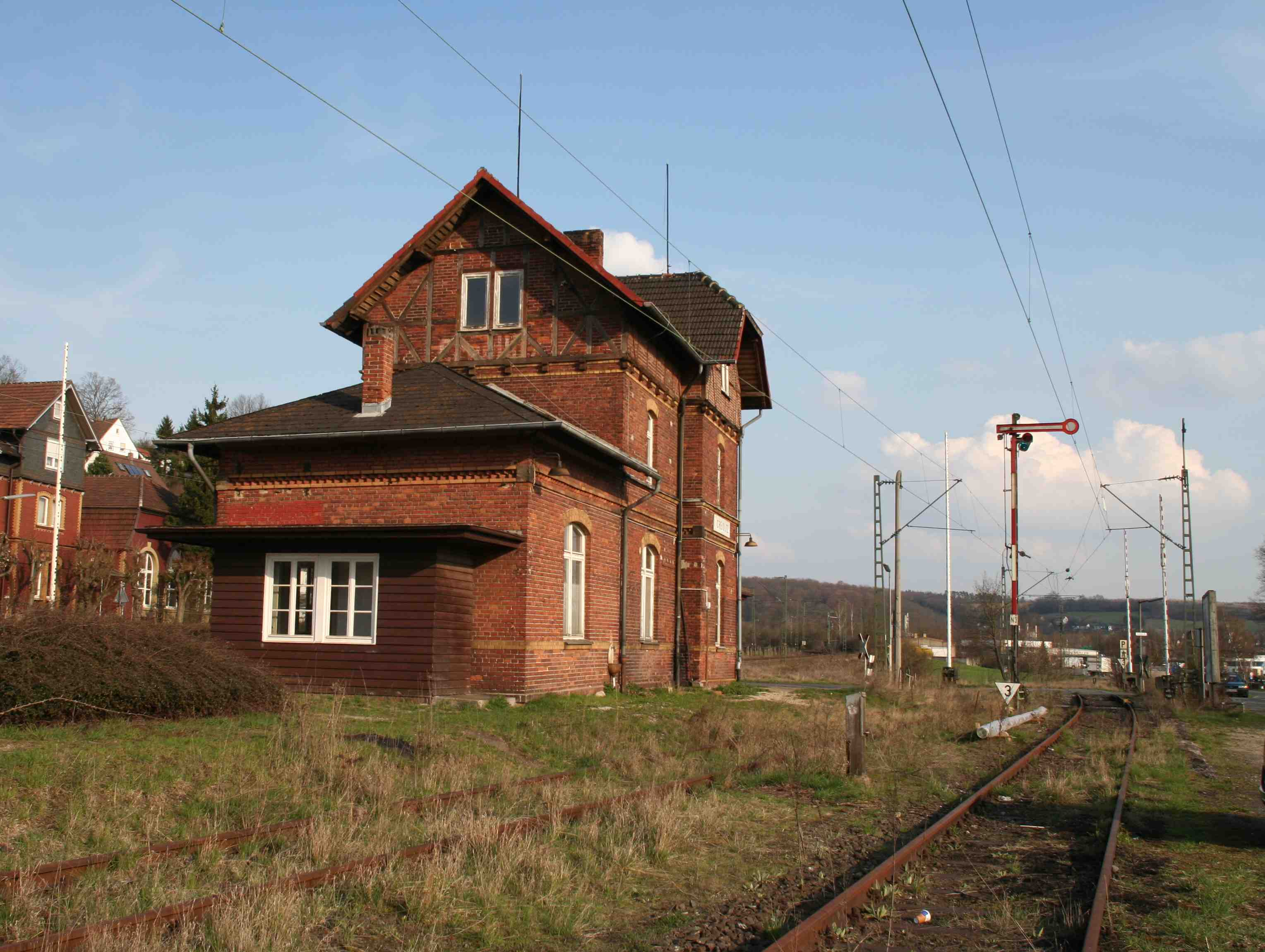 Bahnhof CreidlitzBahnhof Creidlitz bie Coburg, Rückseite mit Streckengleis nach Rossach